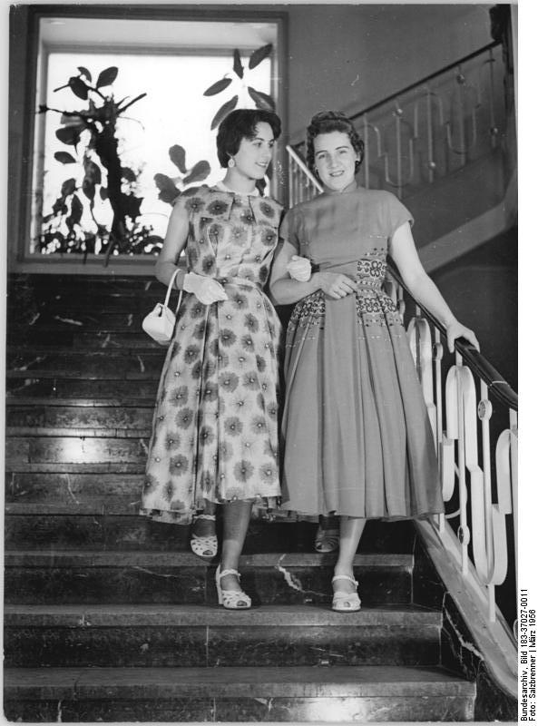 Zentralbild-Salzbrenner We-Th 27.3.1956 Von der Idee bis zum fertigen Modell. Es ist eine unbestreitbare Tatsache, daß der Frühling den Winter mit seinen Schnee- und Eismassen nun endgültig verdrängt hat. Genau so unbestreitbar ist es jedoch, daß mit der zunehmenden Erwärmung die "Kleidersorgen" unserer Frauen in den Vordergrund treten. Wer von ihnen möchte nicht, wenn der Wintermantel nun für einige Monate "eingemottet" wird, ein neues duftiges Kleid, nach dem neusten Schnitt der Mode sein eigen zu nennen? Diese "Sorgen" hätten auch die Modeschöpfer unserer volkseigenen Bekleidungsindustrie, allerdings schon reichlich früher als die "Konsumenten". Zu einer Zeit, da Schneestürme über das Land brausten und jeder froh war, sich in den warmen Wintermantel hüllen zu können, besprachen die Kolleginnen des VEB Kleiderwerk Dresden die neuen Sommermodelle und gingen an die Arbeit. UBz: (links) Nettes Sommerkleid aus Zellwolle auf Seindenfinish (Neuentwicklung). Der Ausschnitt ist mit einem grossen Kragen geziert. Rock glockig geschnitten und in Falten gelegt. (rechts) Ein Kleid aus Zellwolle Kammgarn mit Bordürenstickerei. Das Kleid ist hochgeschlossen und für kühle Tage gedacht.